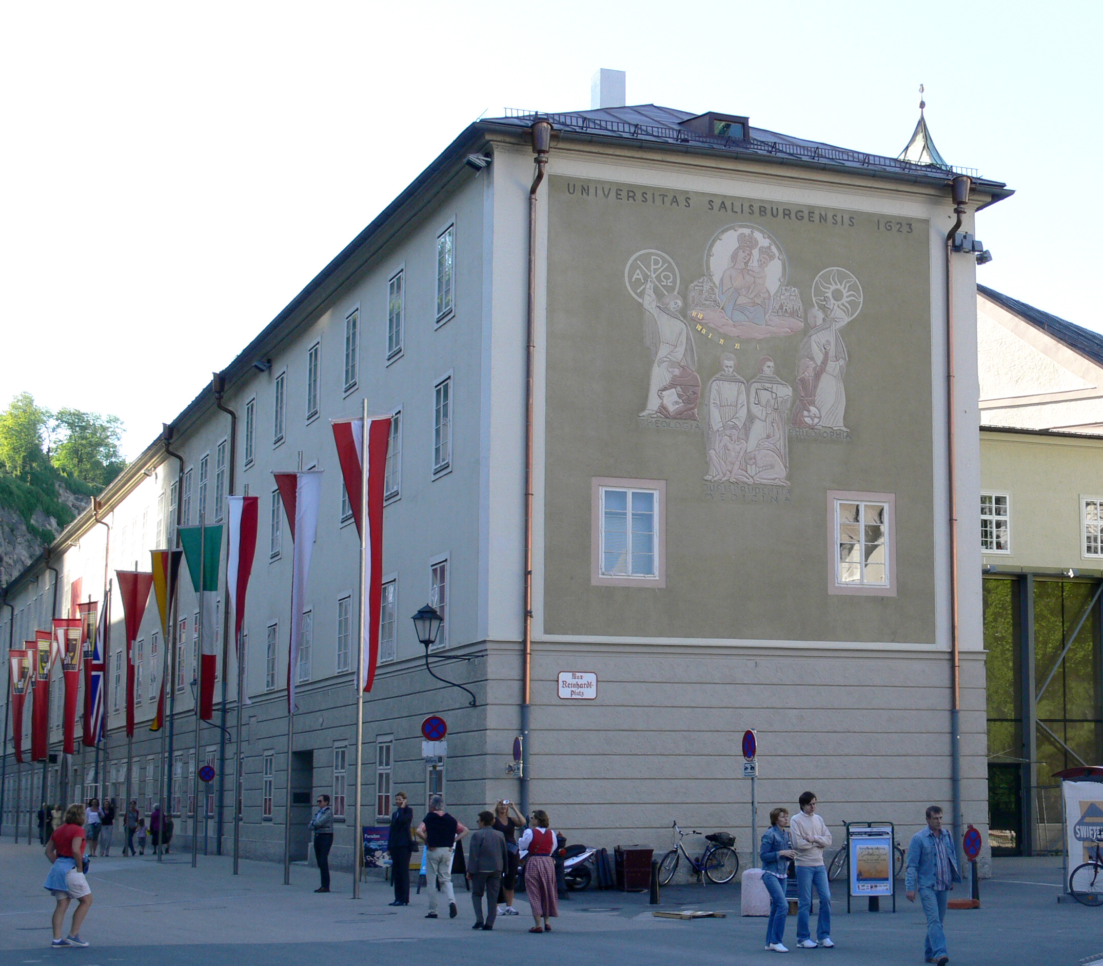 Universitätsbibliothek Salzburg, Hofstallgasse (gegenüber dem Festspielhaus)